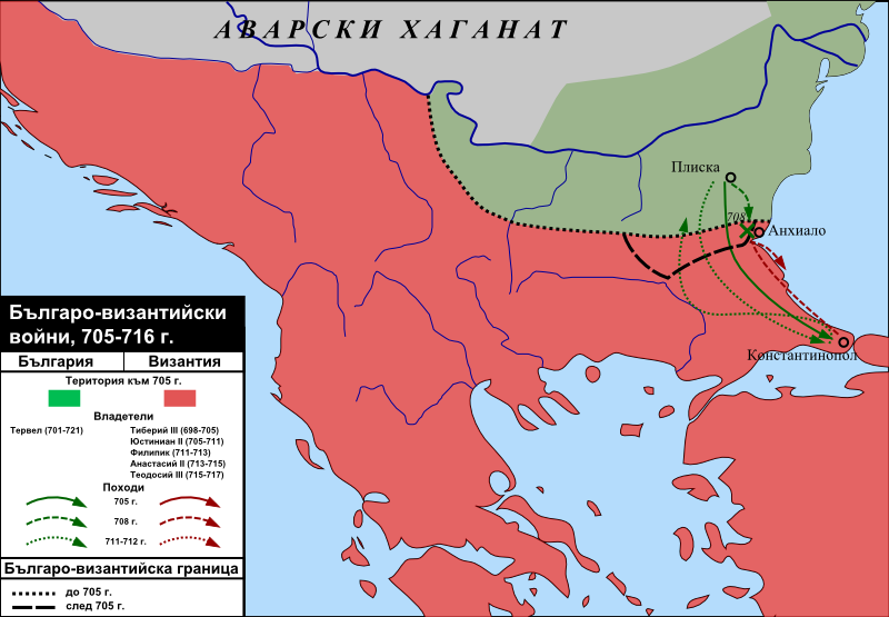 Карта на българо-византийските войни по времето на Тервел